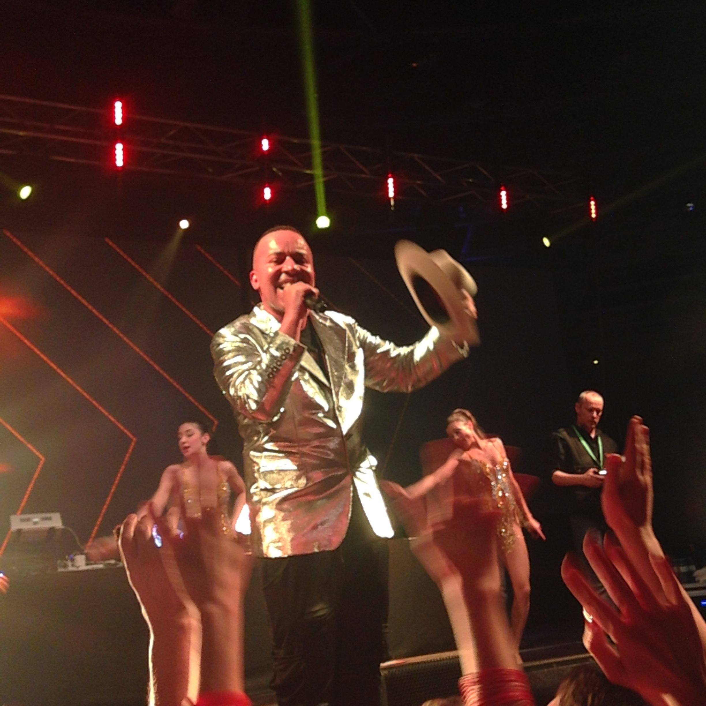 Lou Bega am 8.02.2014 auf der "Die 90er MEGA SAUSE" Party im Velodrom Berlin